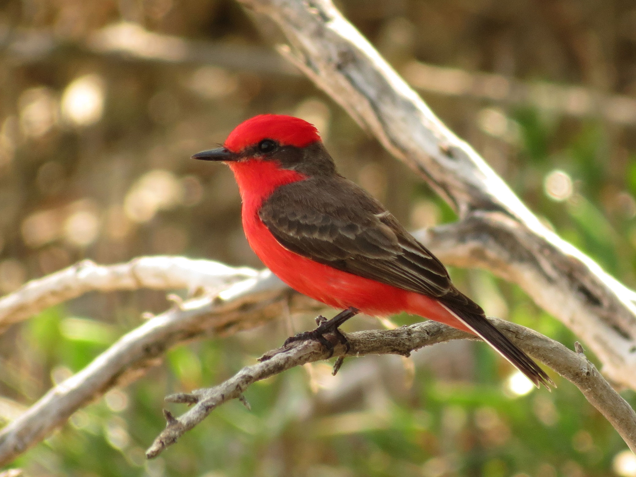 Pyrocephalus rubinus. Celestún Biosphere Reserve, Yucatán, México.